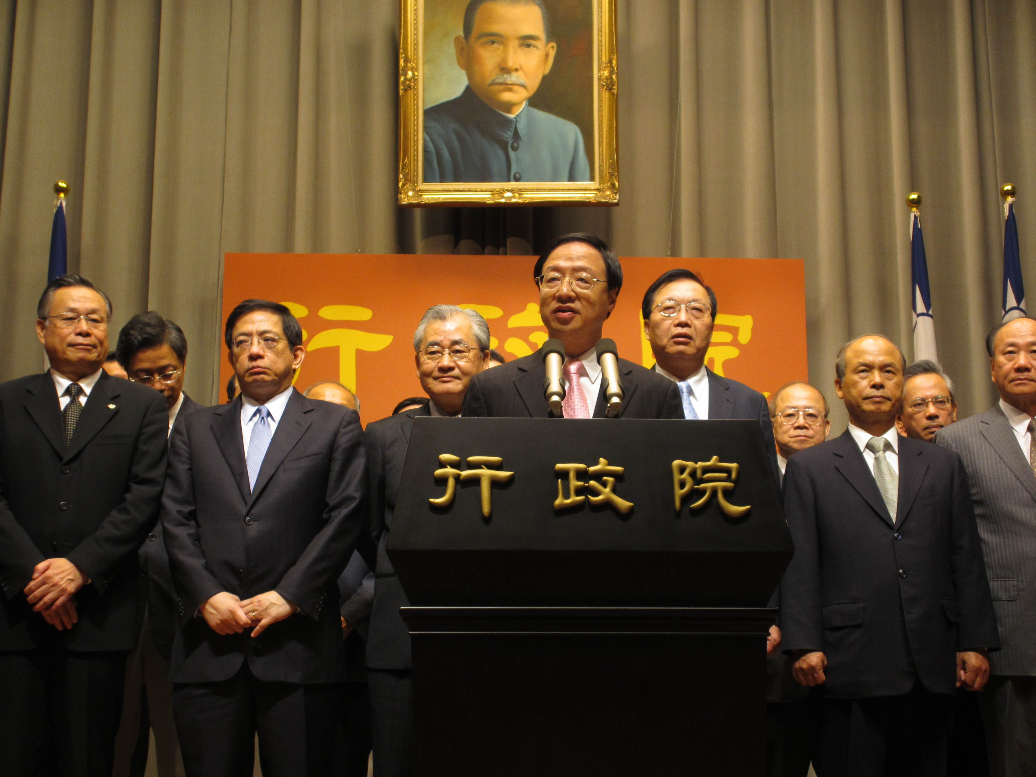 中華民國行政院院長江宜樺率領閣員召開記者會反駁倒閣案。